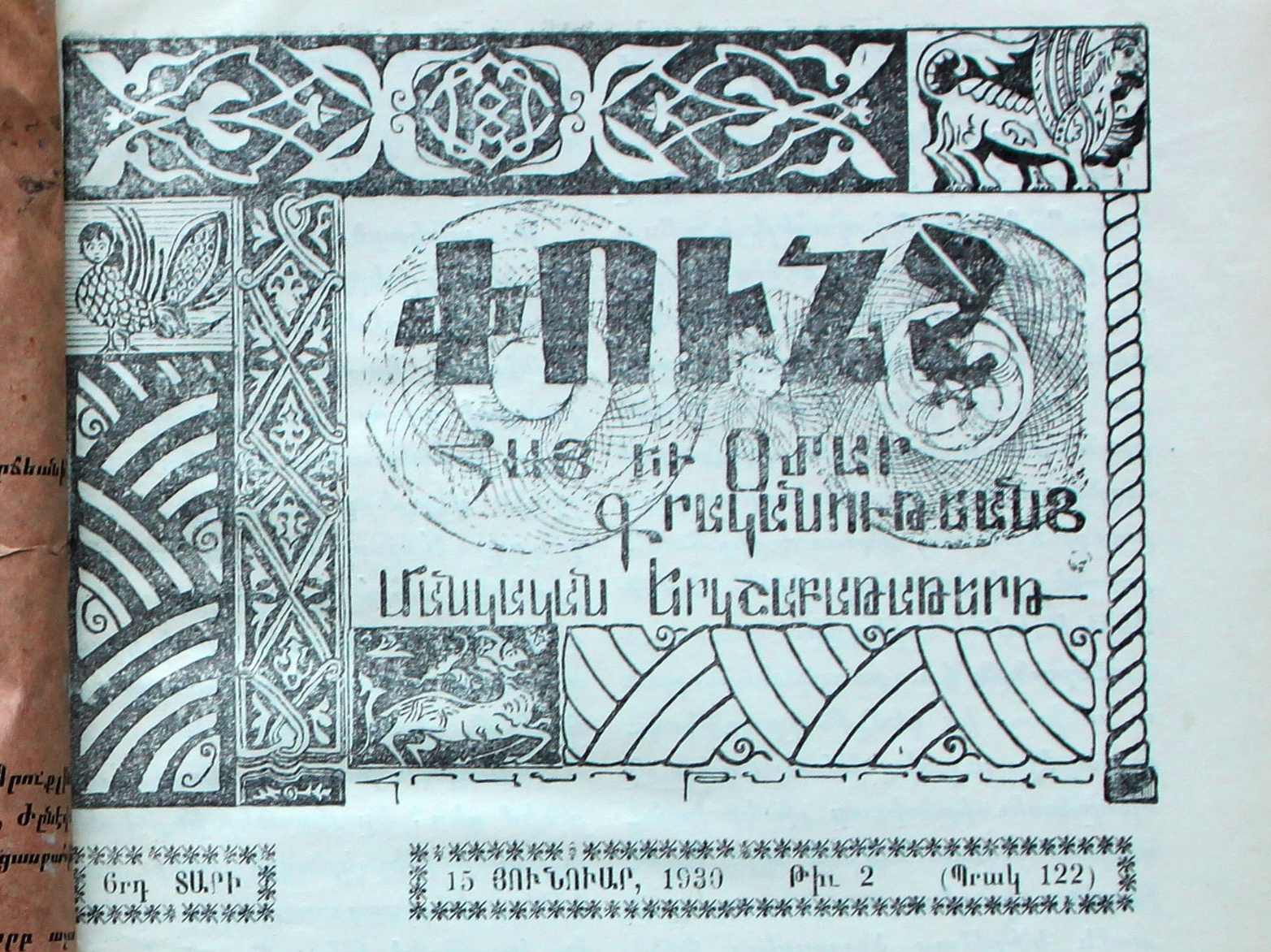 Փունջ երկշաբաթաթերթ շպիգել